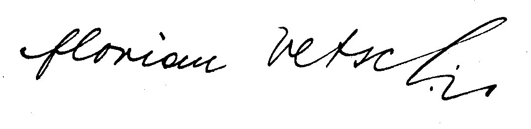 Florian Vetsch (1921-1972) war schweizerischer Nationalrat und Regierungsrat des Kantons St. Gallen. - Diese Unterschrift stammt vom 31. Juli 1946. Familienarchiv 2006.